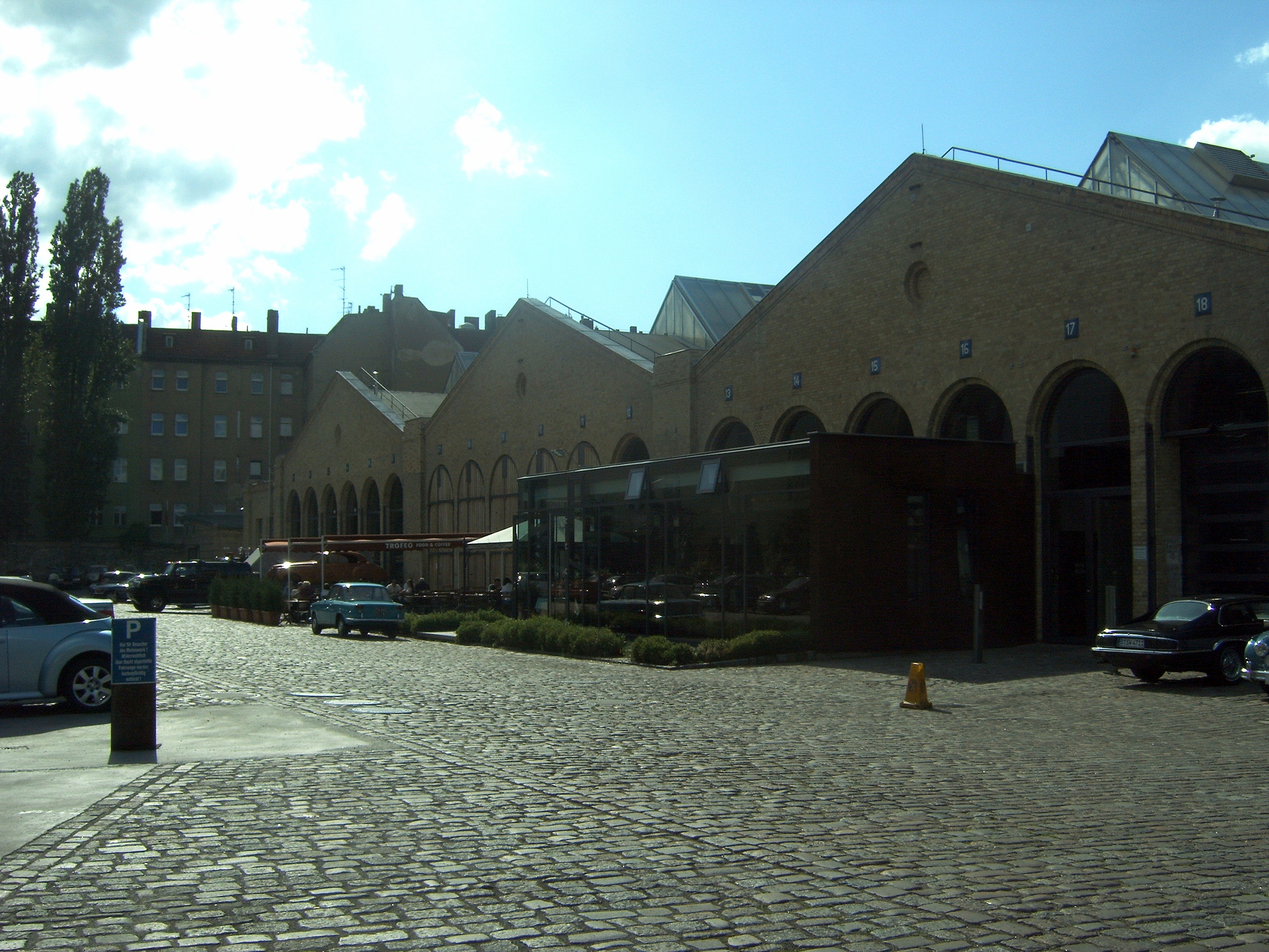 Meilenwerk Berlin von außen